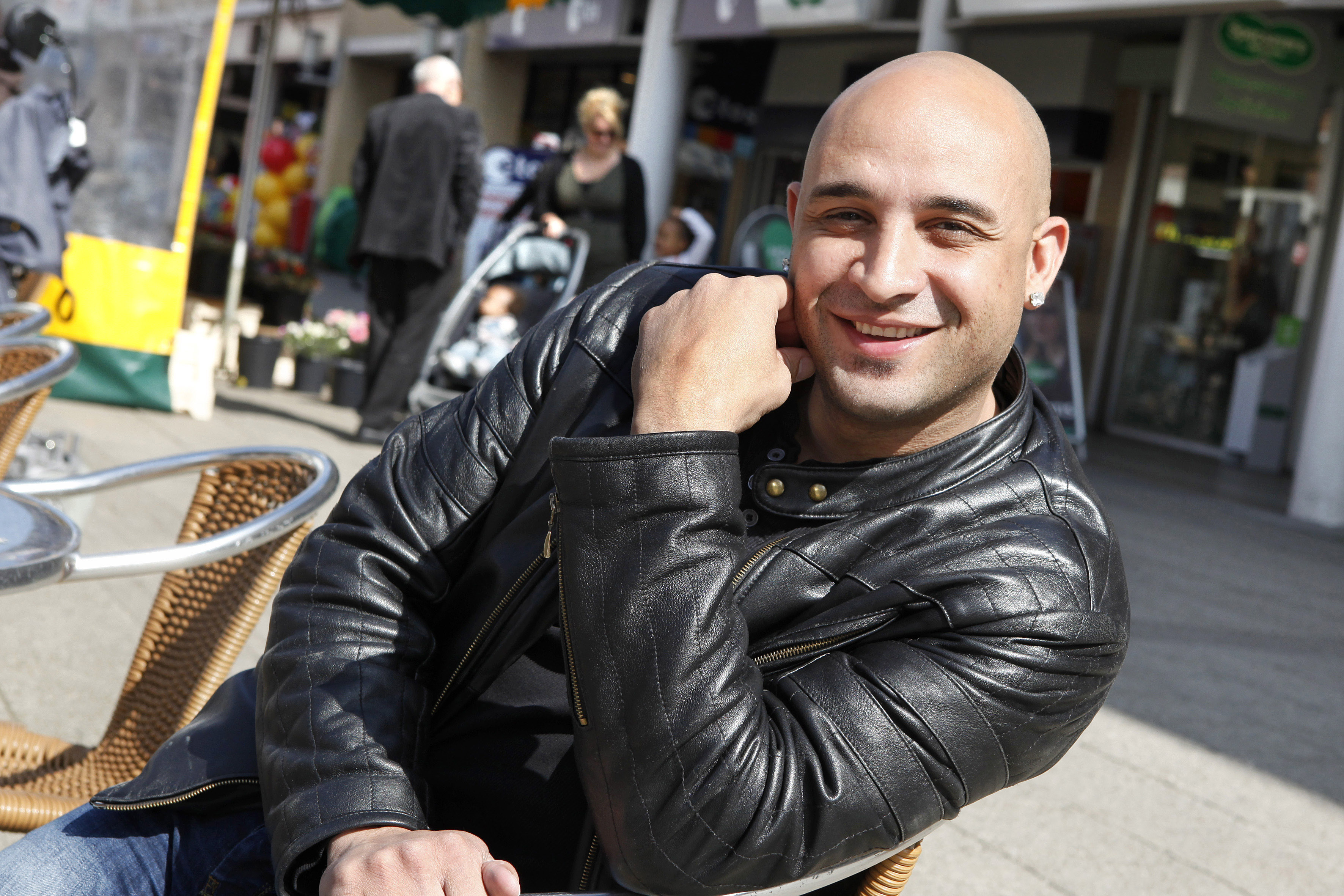 Soccer player